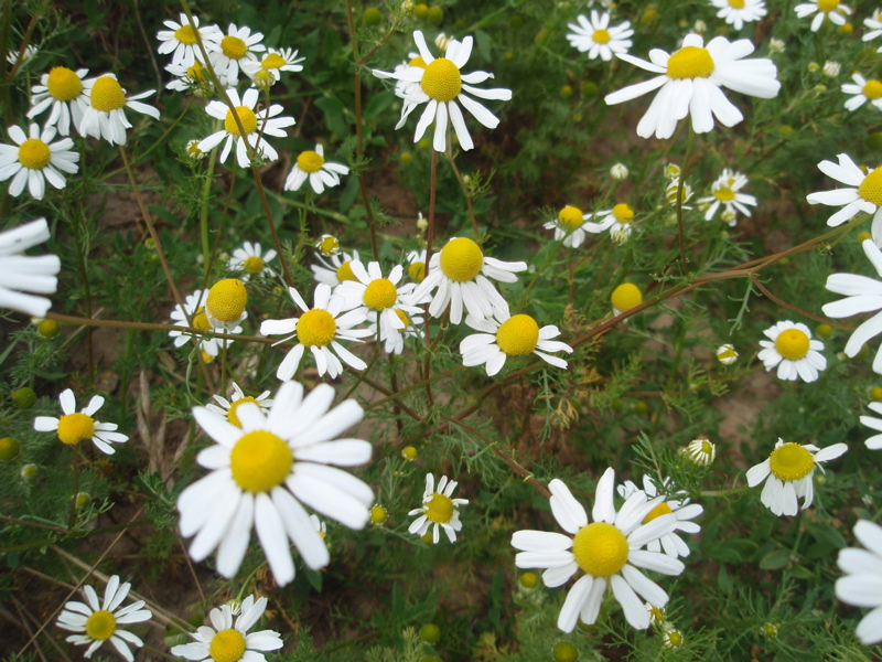 Les Egyptiens l'avaient dédiée au soleil en raison de son efficacité contre les fièvres; Dioscoride et Galien la préconisaient dans le même domaine et aussi contre les courbatures ou les troubles féminins (d'où son nom savant de Matricaria chamomilla).